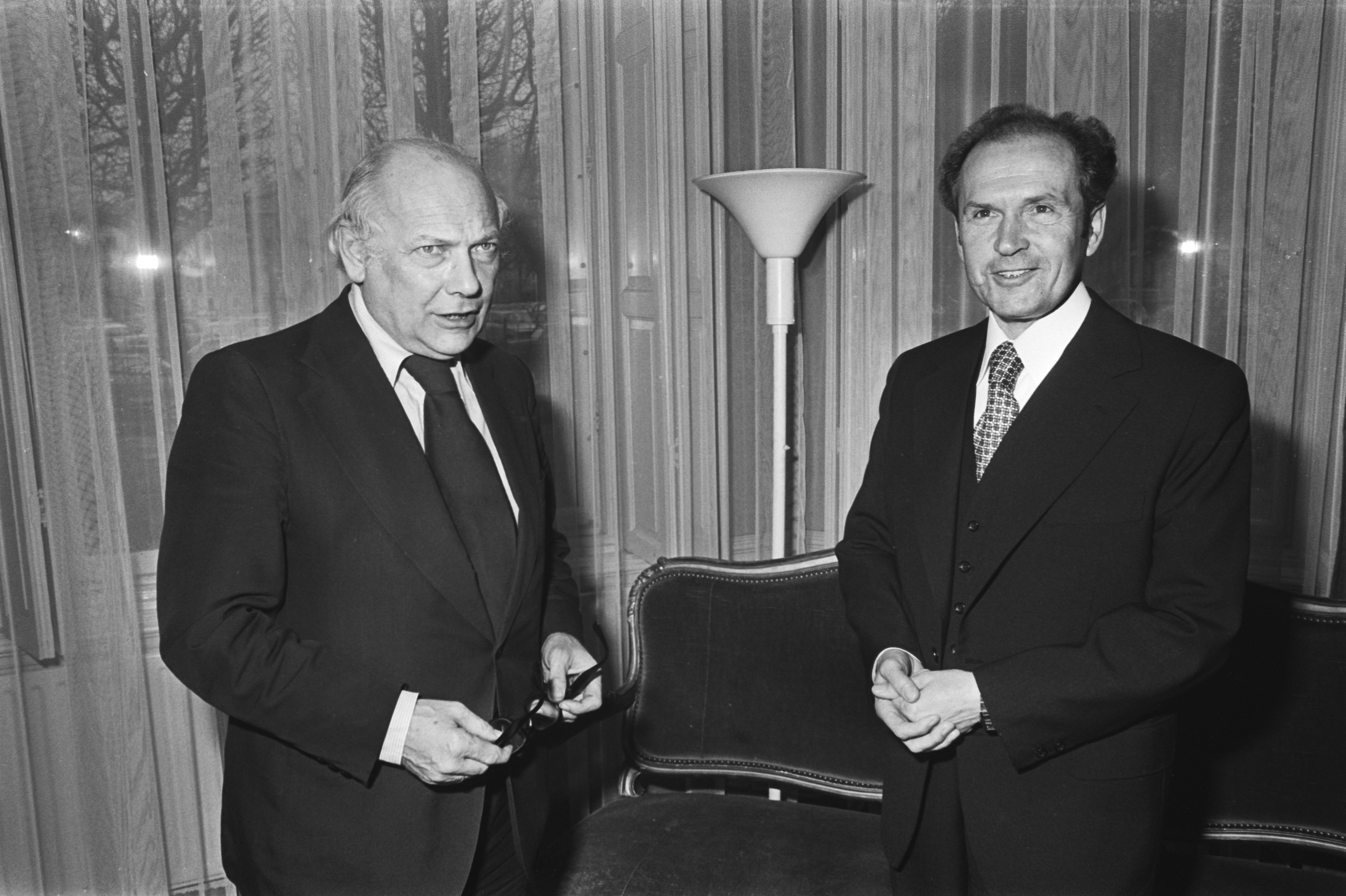 Collectie / Archief : Fotocollectie Anefo Reportage / Serie : [ onbekend ] Beschrijving : Premier Den Uyl ontvangt minister Buitenlandse Zaken van DDR, Oskar Fischer Datum : 24 januari 1977 Locatie : D.D.R., Duitsland Trefwoorden : ministers Persoonsnaam : Uyl, Joop den Fotograaf : Peters, Hans / Anefo Auteursrechthebbende : Nationaal Archief Materiaalsoort : Negatief (zwart/wit) Nummer archiefinventaris : bekijk toegang 2.24.01.05 Bestanddeelnummer : 928-9932